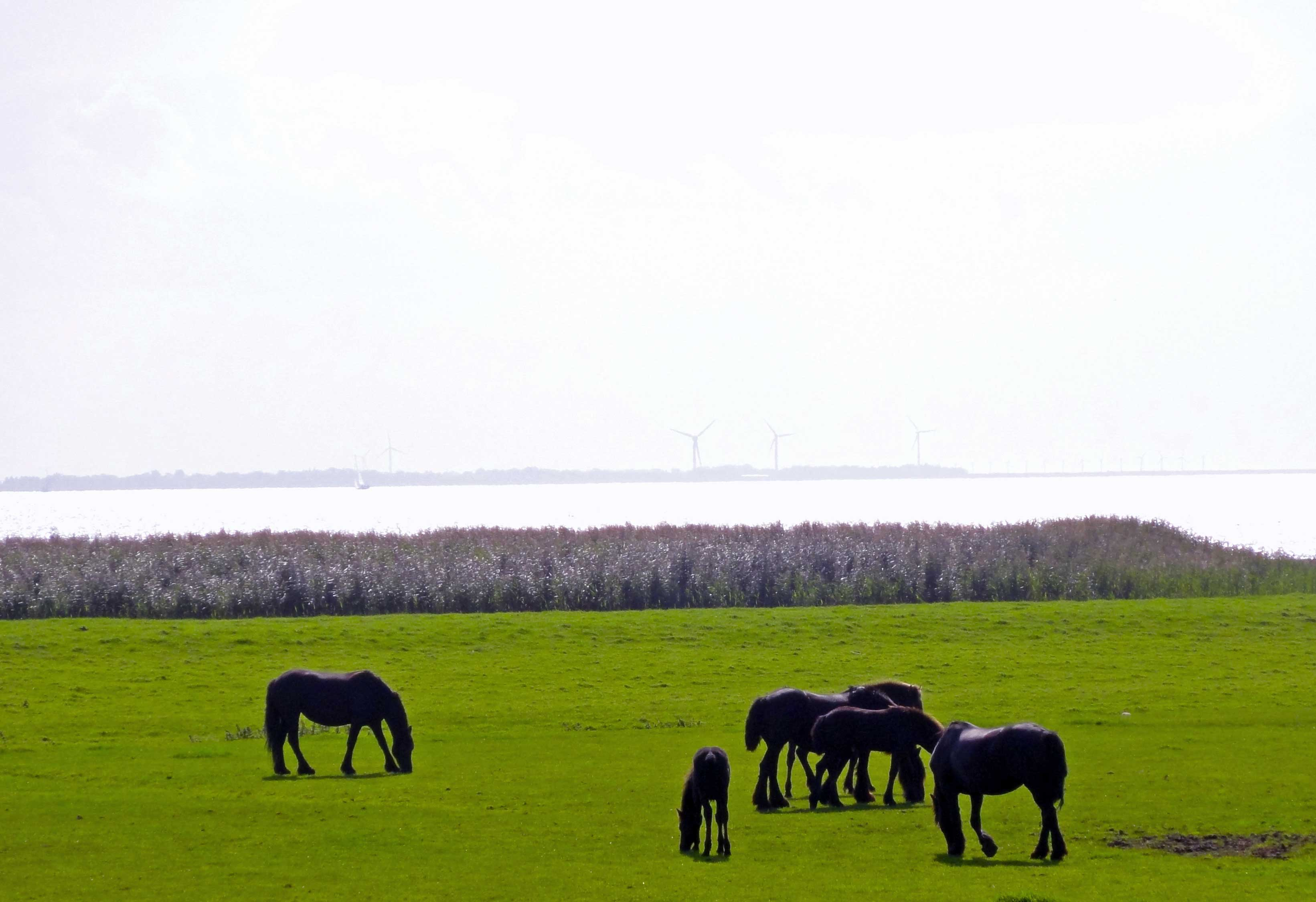 Zicht vanaf de Sondelerdyk nabij Tacozijl